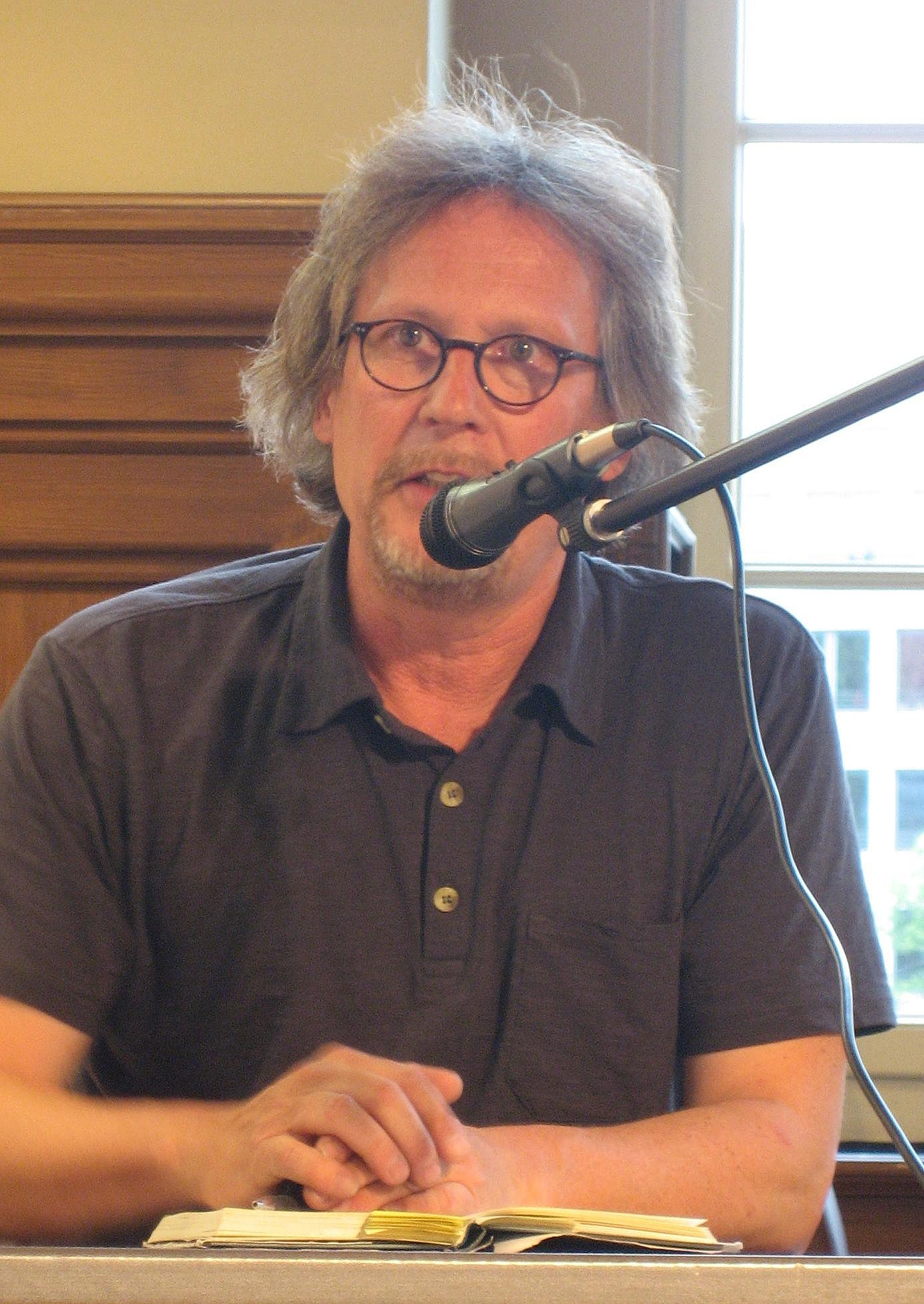 Harald Martenstein (*1953) liest in der Reihe „Freier Eintritt – Freie Rede“ in den Promenaden Hauptbahnhof Leipzig